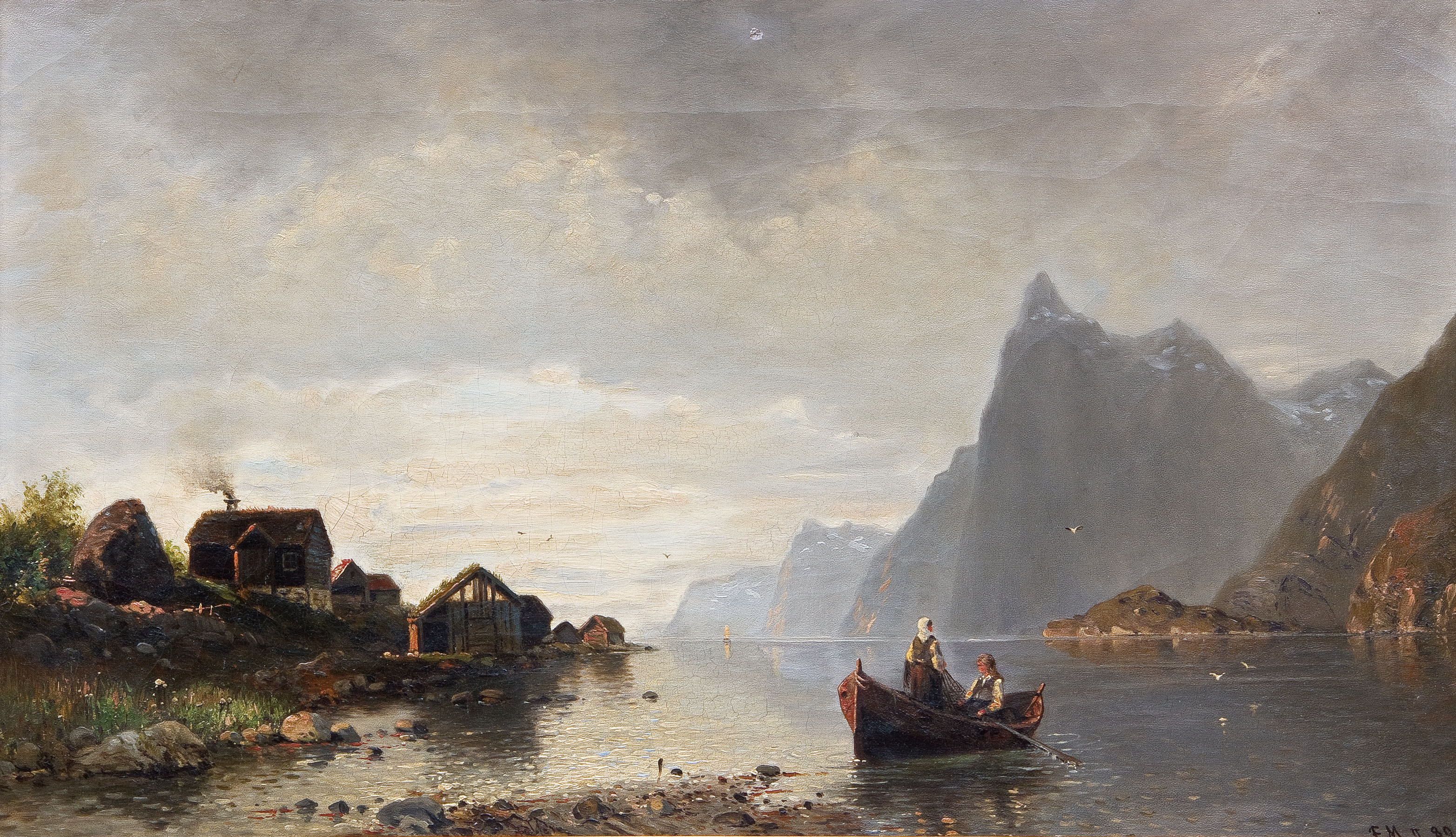 Seelandschaft in der Abenddämmerung. Öl auf Leinwand, unten rechts monogrammiert und datiert F.M. II 90. 35 x 80.5 cm